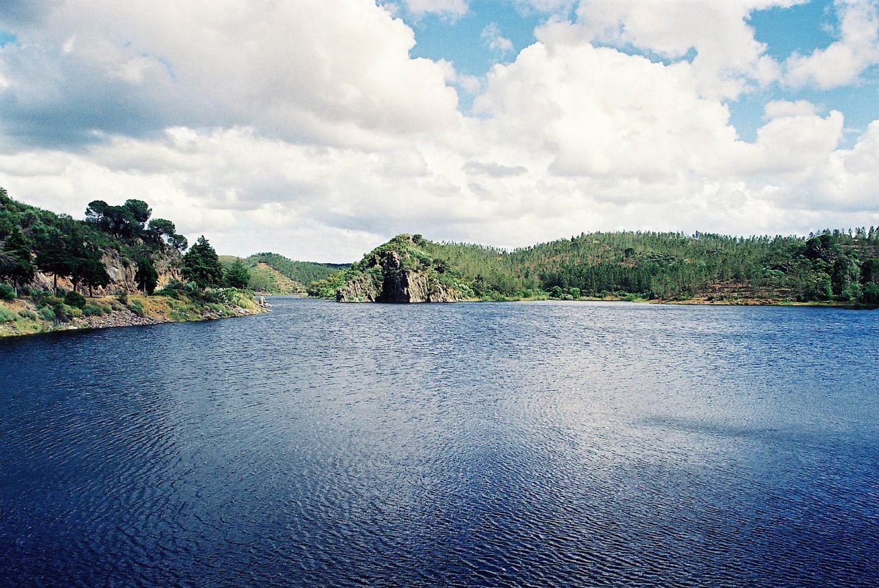 Barragem do Maranhão - Avis (Portugal)